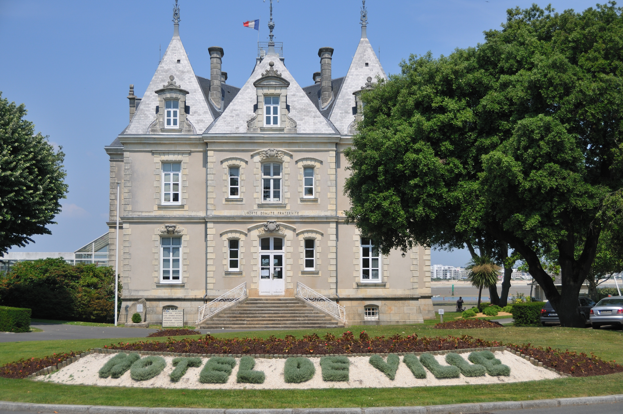 Hôtel de Ville, Le Pouliguen, Loire-Atlantique, France